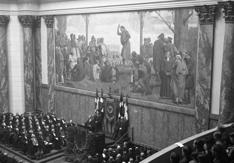 Die grosse Reichsgründungsfeier der Berliner Universität in der Aula der preussischen Staatsbibliothek! Blick in die grosse Aula der preussischen Staatsbibliothek während der Rede von Professor Dr. Rudolf Smend. Information added by Wikimedia users.This is not in the current Staatsbibliothek, but in the Alte Bibliothek aka Kommode. The painting, Fichtes Rede An die deutsche Nation (destroyed in WWII) was by Arthur Kampf.